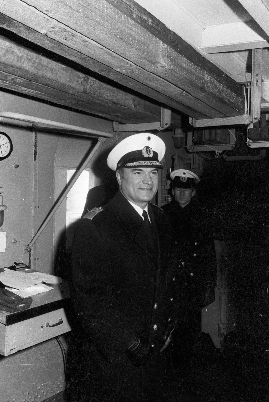 beim Besuch auf dem Zerstörer ROMMEL (D 187).